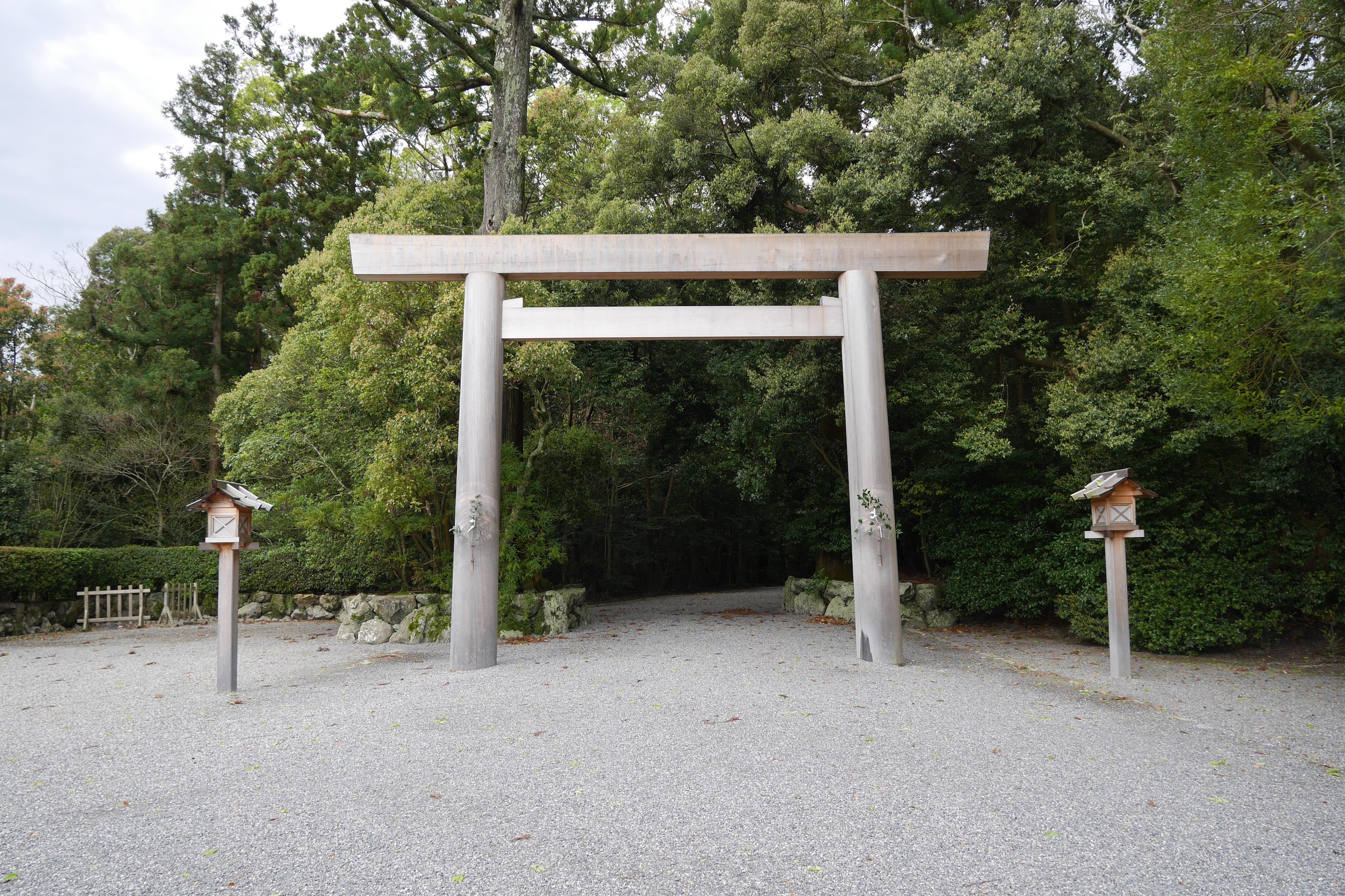 伊勢神宮外宮の第一鳥居の画像。